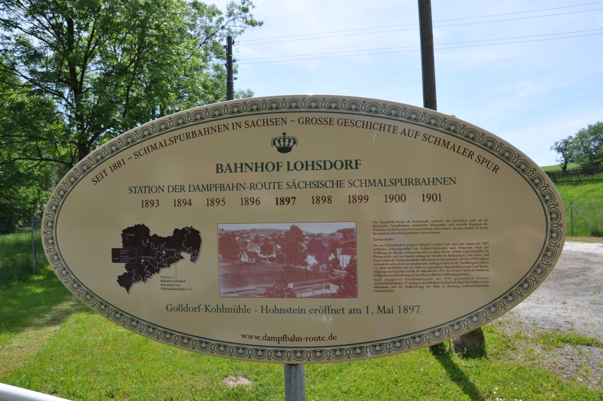 Informationstafel der Dampfbahnroute Sachsen am Bahnhof Lohsdorf, Schwarzbachbahn